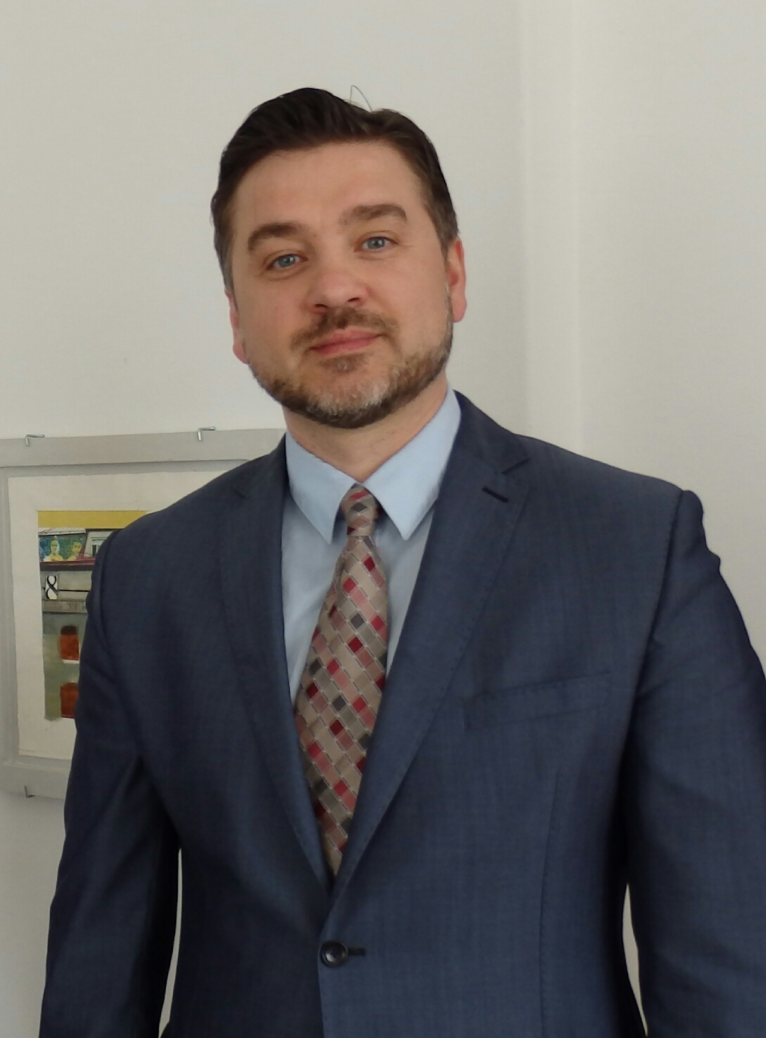 Sten Schwede